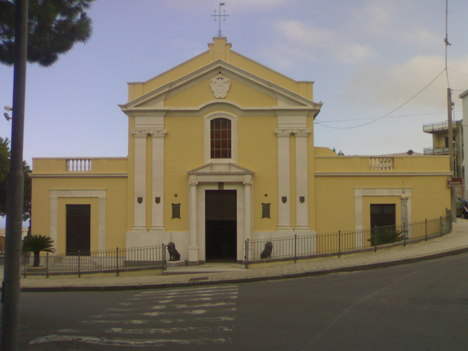 Facciata restaurata del santuario di Maria Santissima del Carmelo a Palmi.